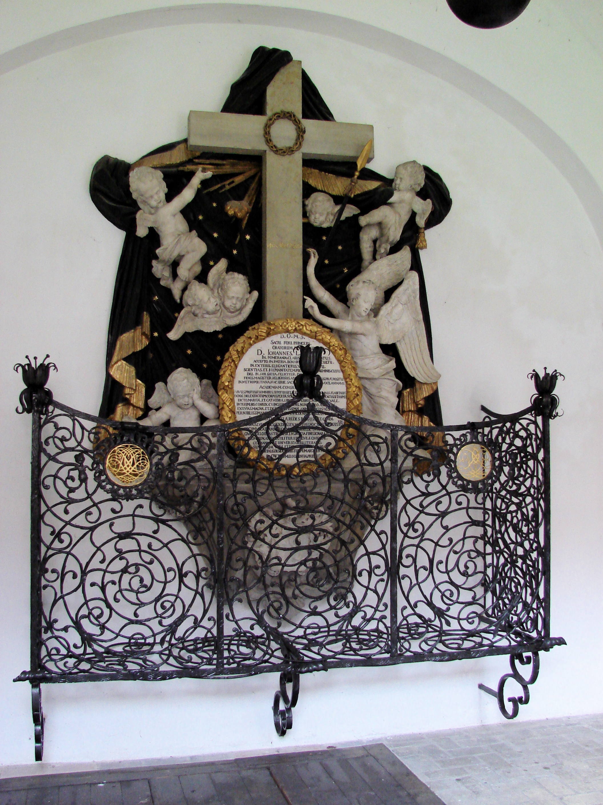 Gravminde over Johannes Lassenius (1636—1692), Sankt Petri Kirke, København